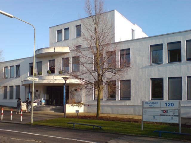 ehemaliger Sitz des Max-Planck-Institutes für europäische Rechtsgeschichte (MPIER) im Hausener Weg 120. 2014 erfolgte der Umzug in das neue Institutsgebäude auf dem Campus Westend, Hansaallee 41 mit einer kleinen Feier zum 50. Geburtstag des Instituts. Seitdem Leerstand dieses Gebäudes.